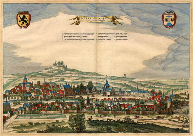 Gerardmontium Vulgo Gheertsberghe